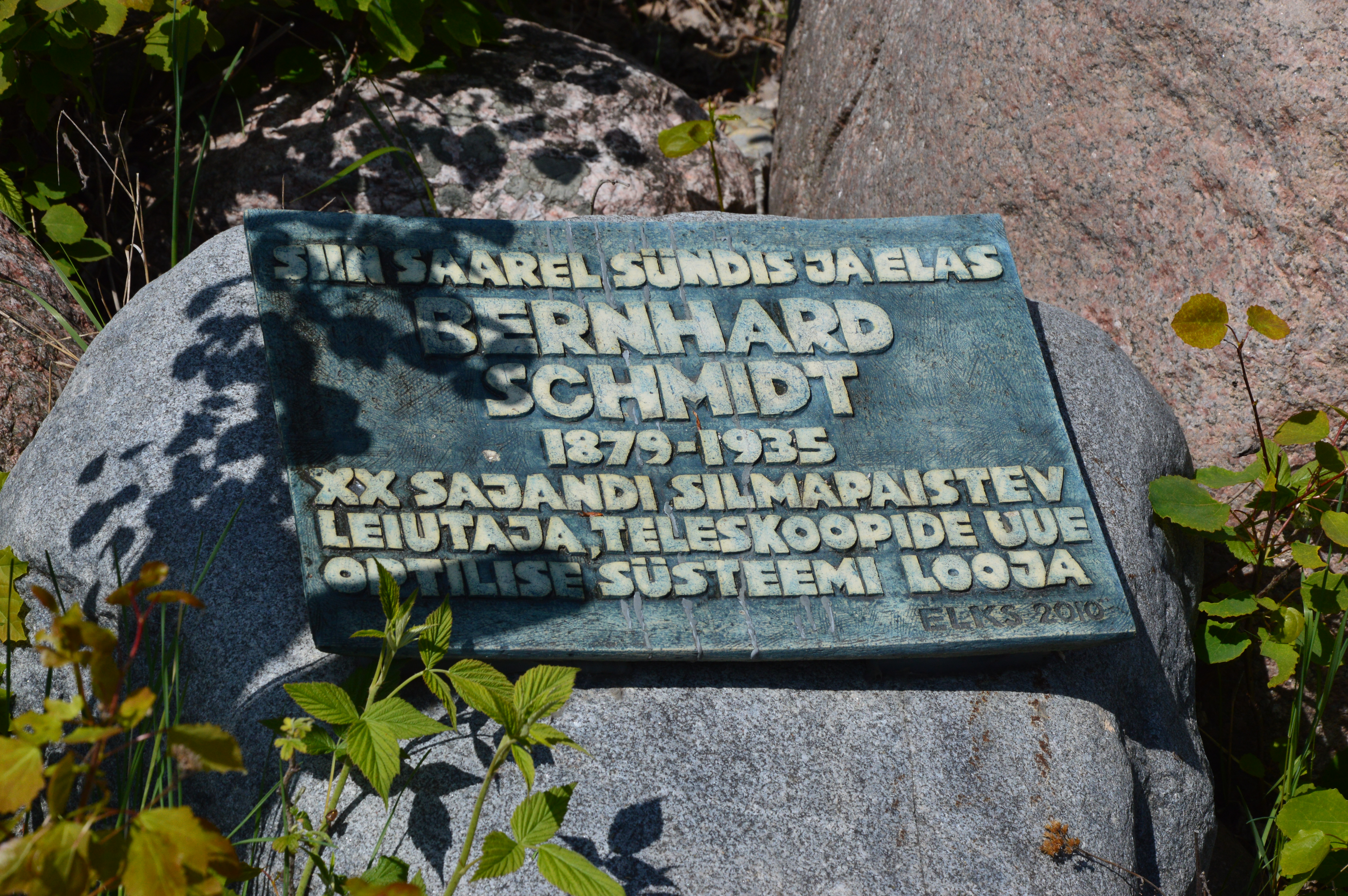 Mälestustahvel Naissaarel.